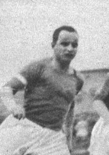 Kajetan Kryszkiewicz, piłkarz poznańskiej "Warty".